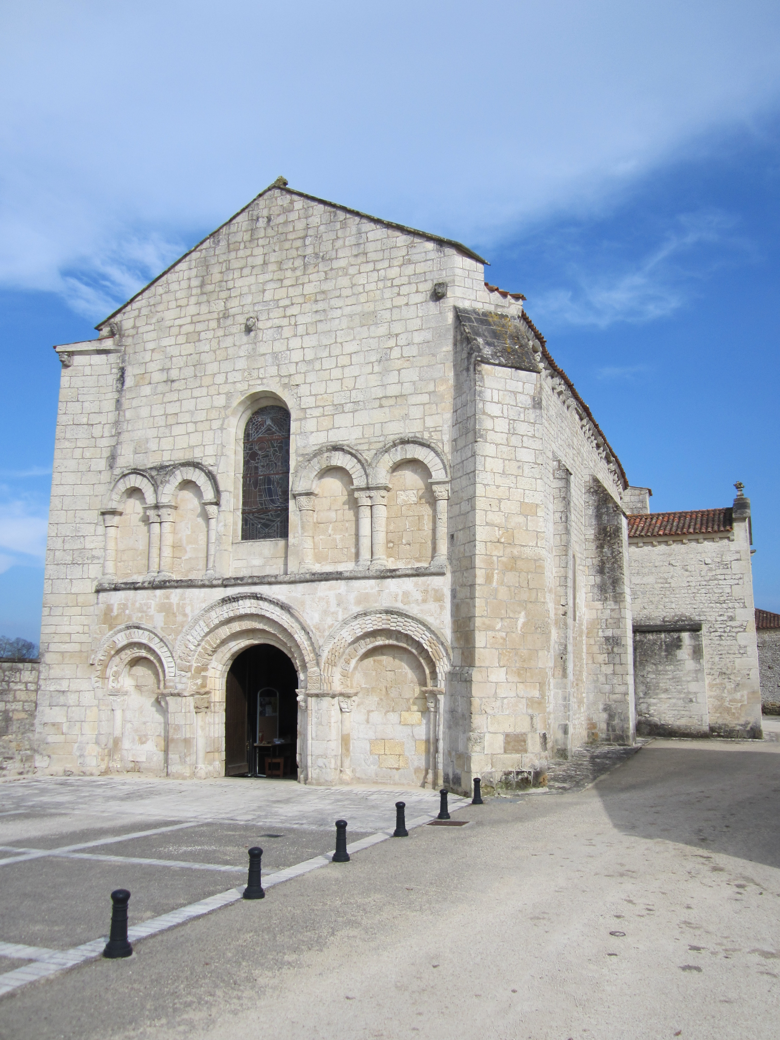 Église Notre-Dame-de-la-Nativité de Fontaines, Vendée (XIIe) .